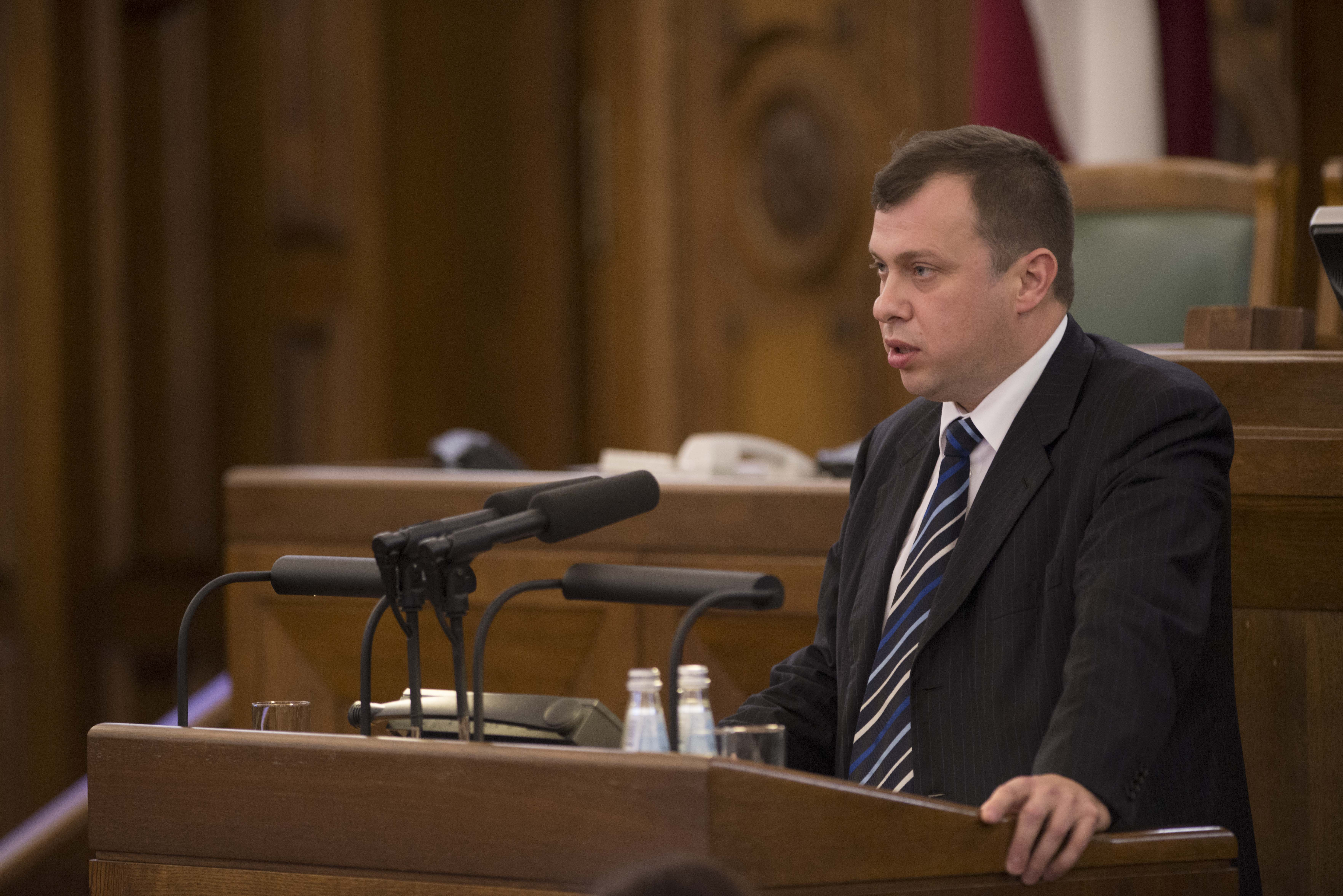 2014.gada 4.novembris. Deputāts Artūrs Rubiks dod svinīgo solījumu. Foto: Juris Vīgulis, Saeimas Kanceleja Izmantošanas noteikumi: saeima.lv/lv/autortiesibas